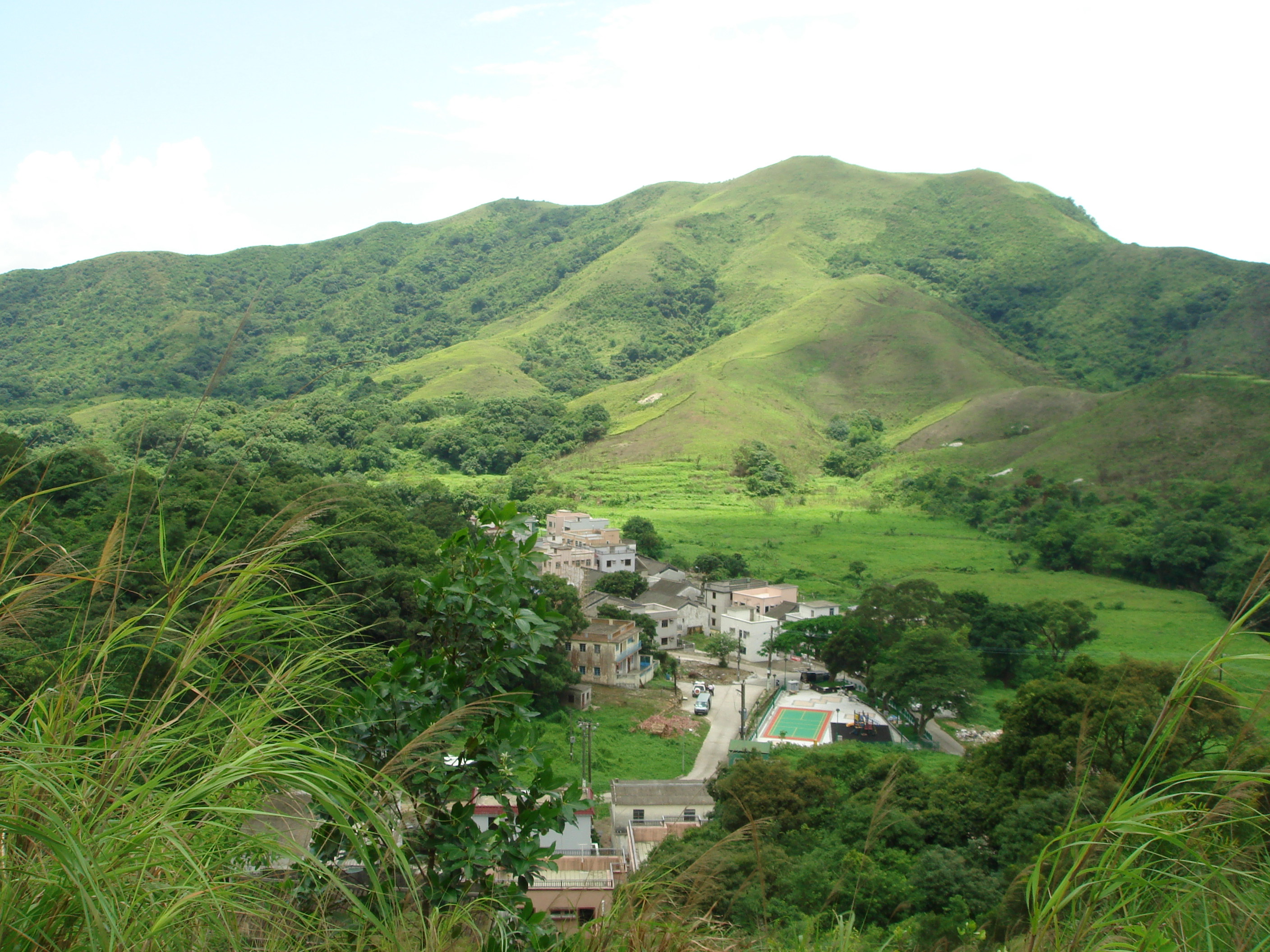 中文（香港）: 蓮麻坑村。